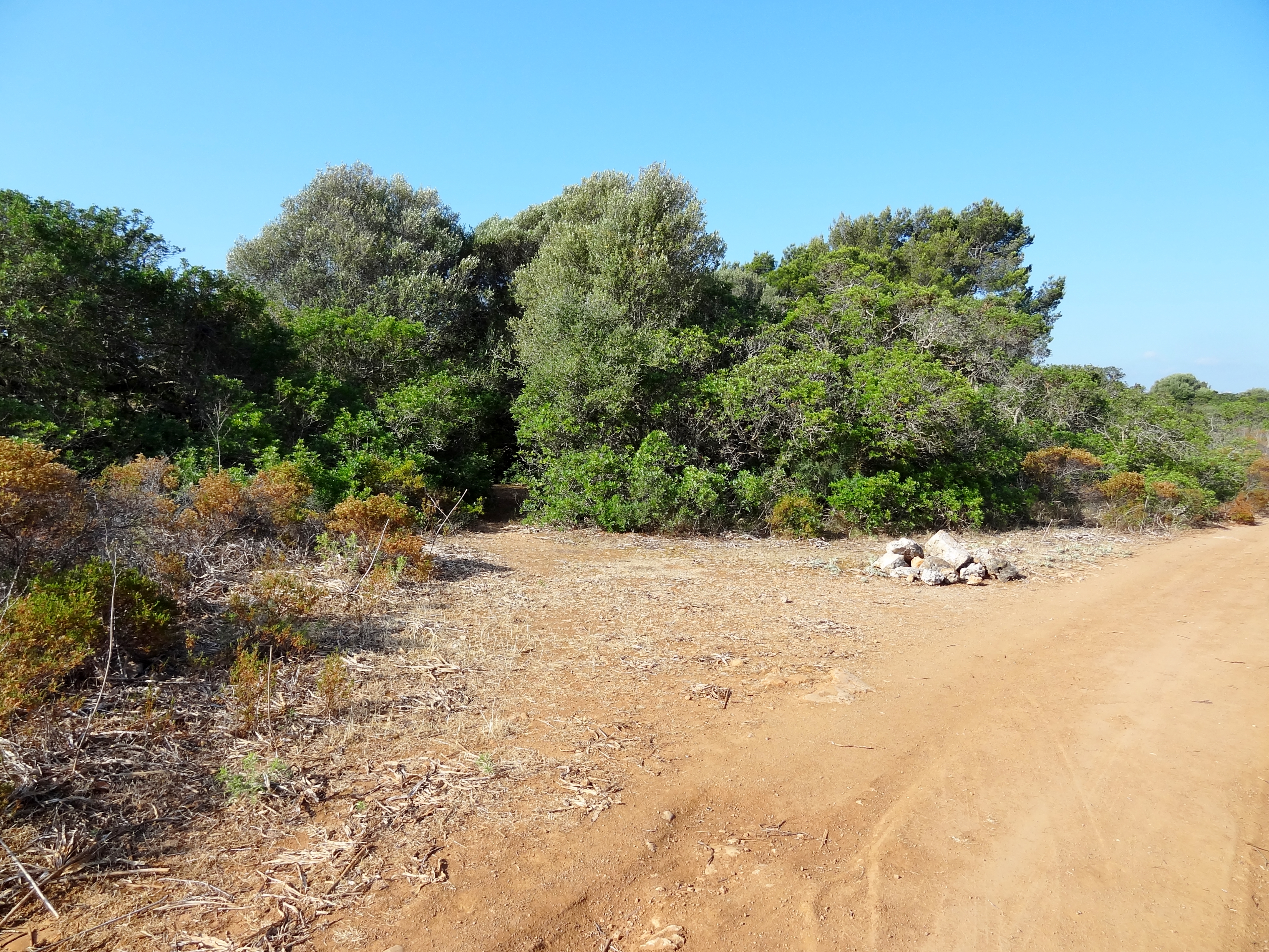 Zugang zur Cova des Pirata an der Ostküste von Mallorca, Spanien